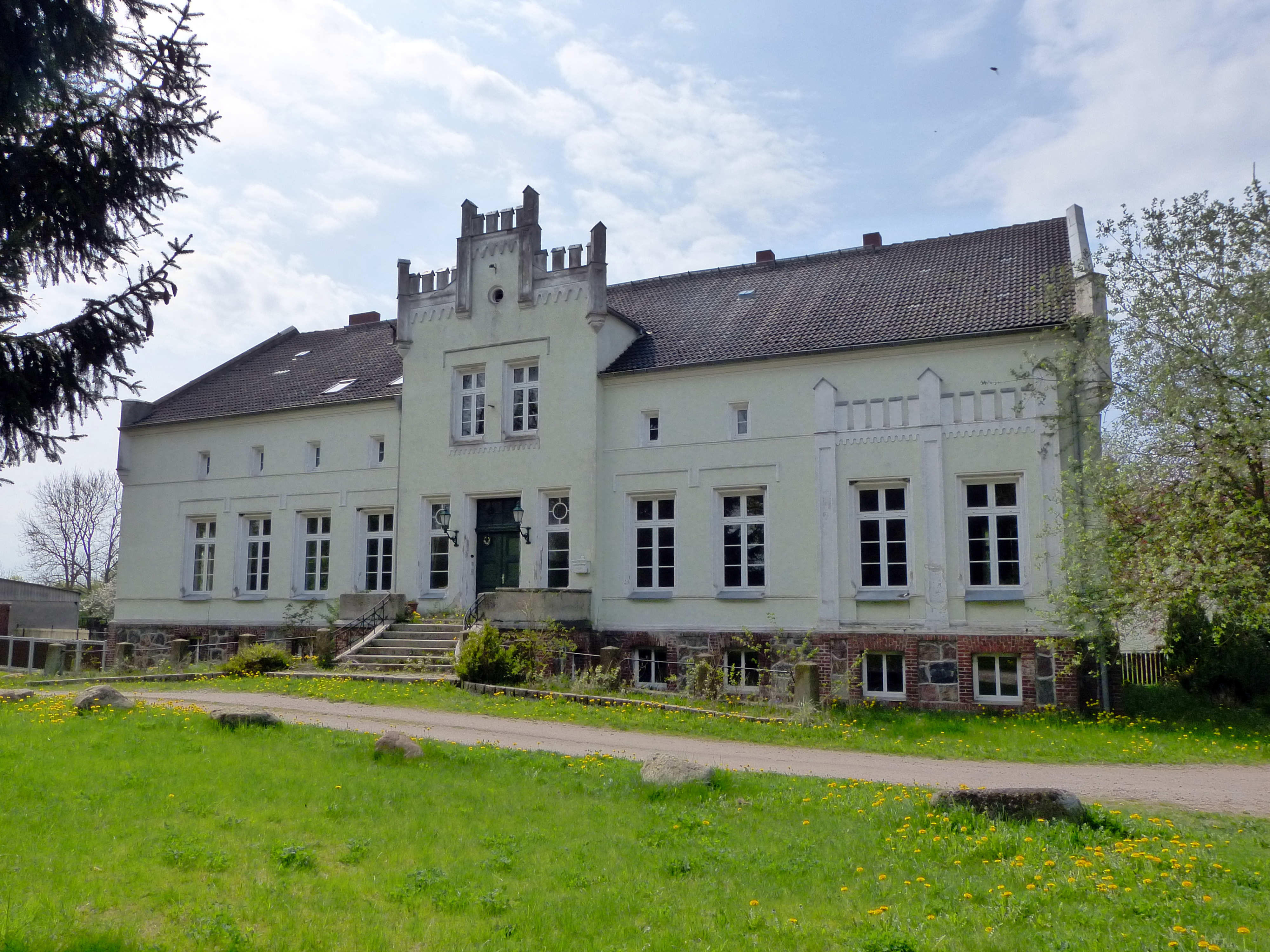 Gutshaus in Trissow, Gemeinde Görmin, Hofseite von Nordosten